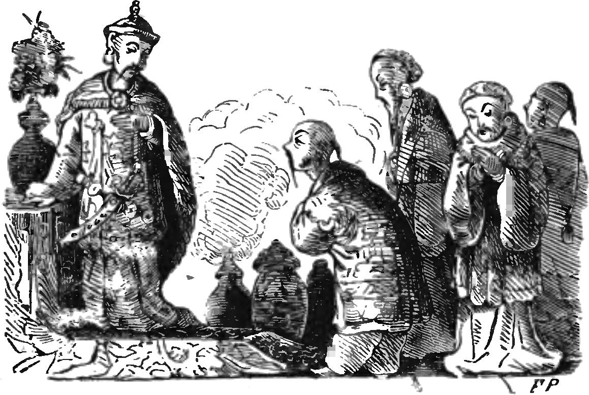 Obrázek na straně 162 knihy Výbor veškerých povídek a báchorek H.C. Andersena.